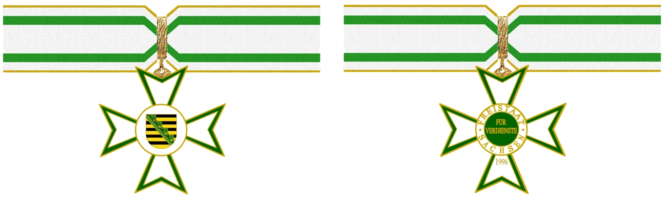 Ein Sächsischer Verdienstorden (Herrenausführung) in einer grafischen Darstellung.